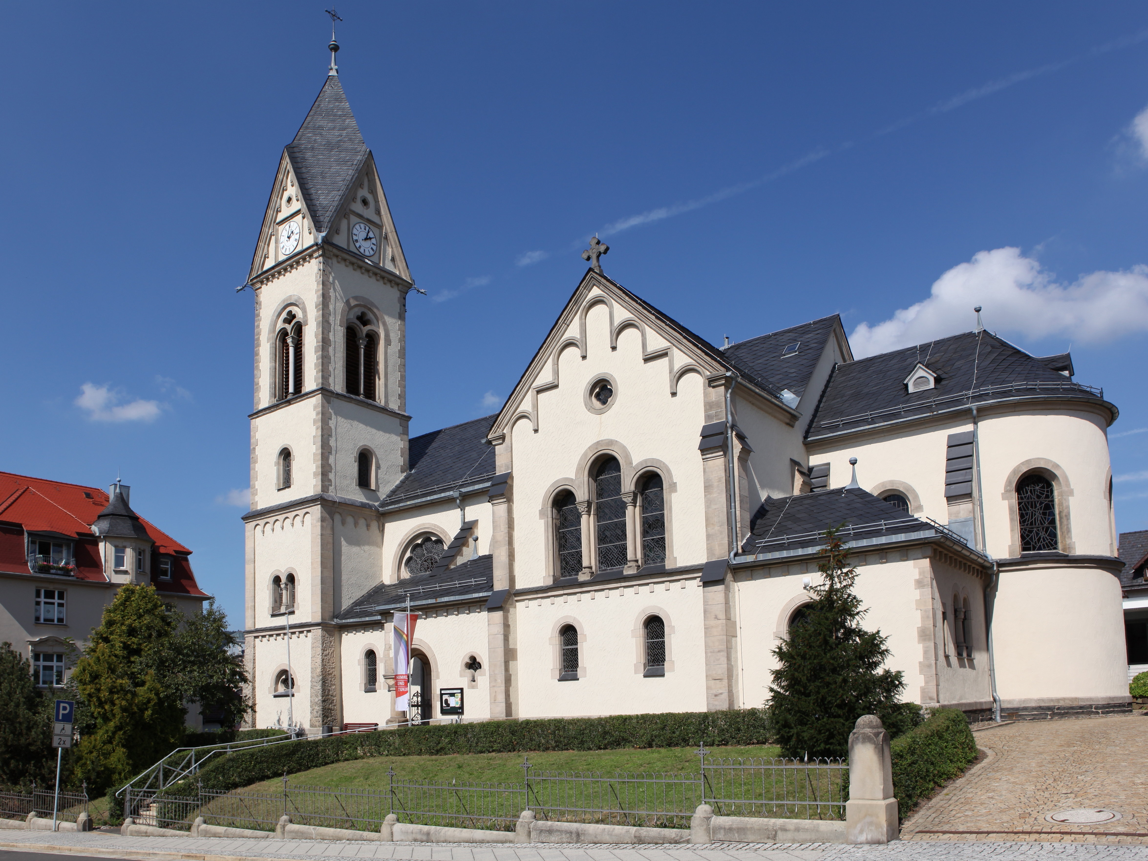 Röm.-kath. Pfarrkirche St. Stephan, neuromanische Gewölbebasilika, 1902/03, von Reimarus & Hetzel, Sonneberg, Rathenaustraße 11